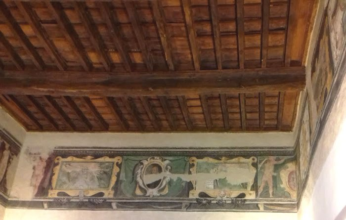 Fregio Affrescato